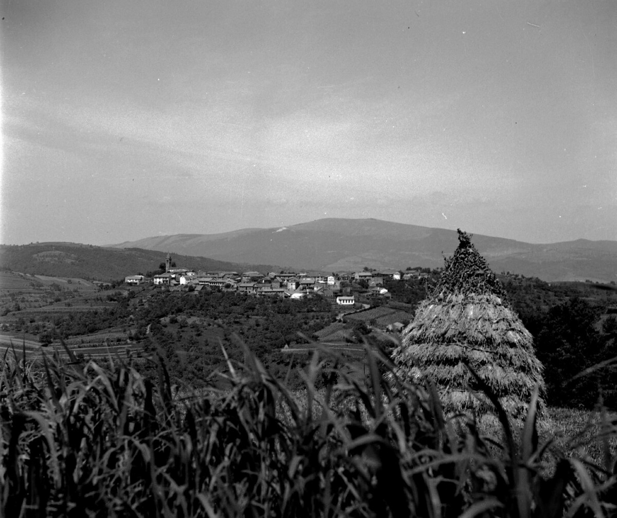 Vas Kozjane s poti Tatre - Kozjane.